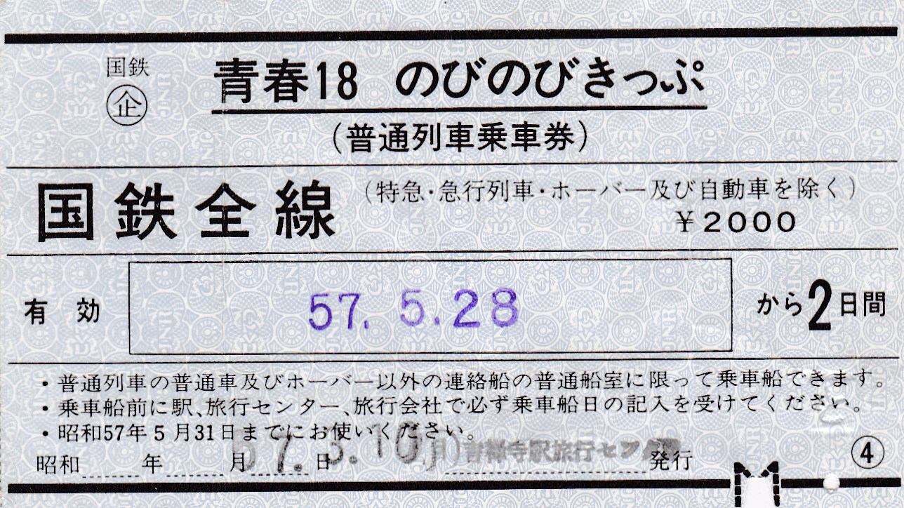 ２日間有効の券片